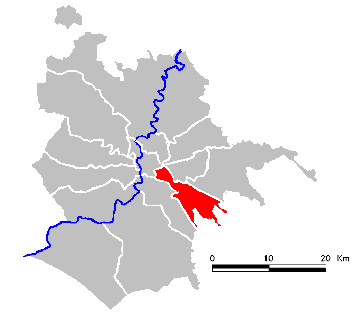 Municipio Roma VII